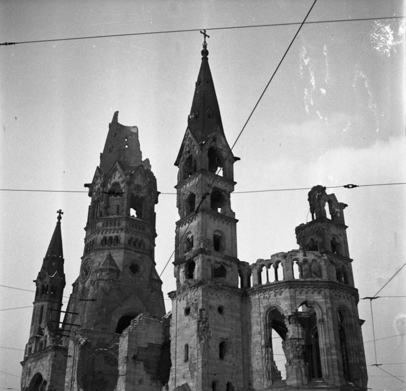 Stadtaufnahmen Berlin. Kaiser Wilhelm Gedächtniskirche Information added by Wikimedia users.